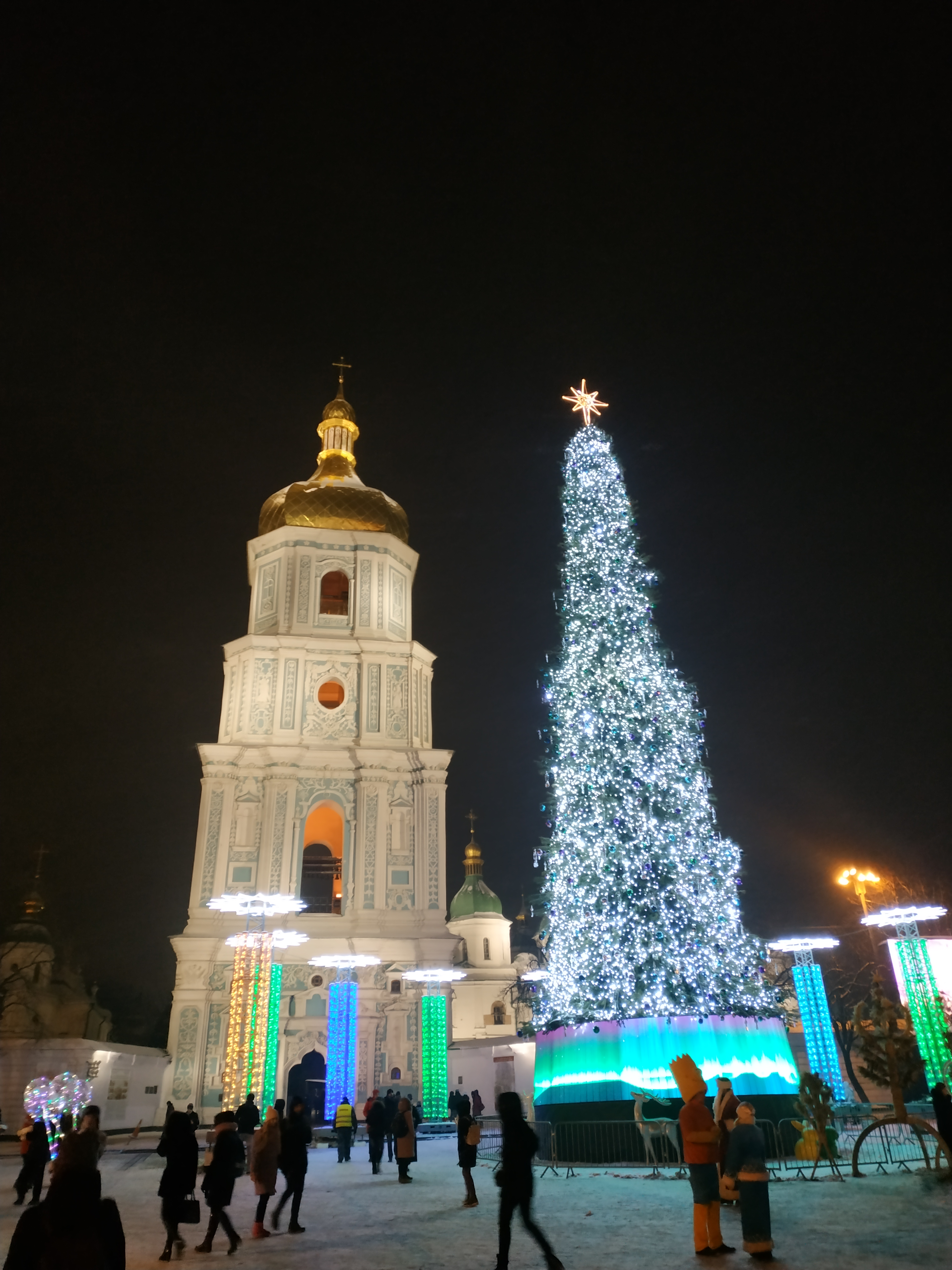 Новогодняя ёлка в центре Киева